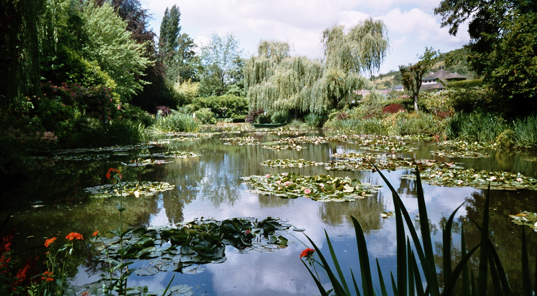 Giverny, jardin de Claude Monet, basin aux nymphéas